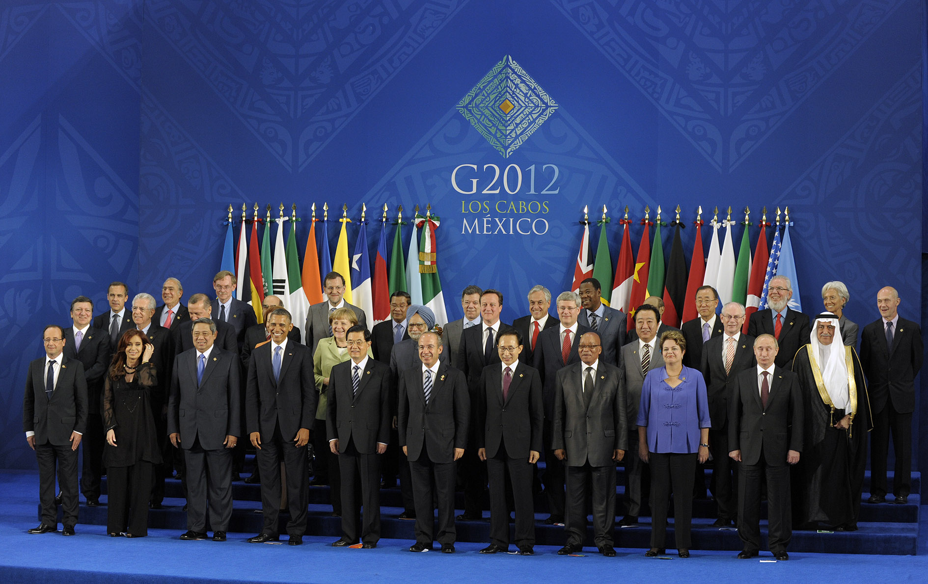 Foto de familia de la Cumbre del G-20 2012, Los Cabos, México.